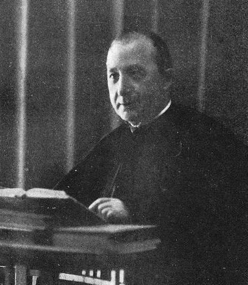 Tomás Argüelles, fotografía en Vida Gallega 1923